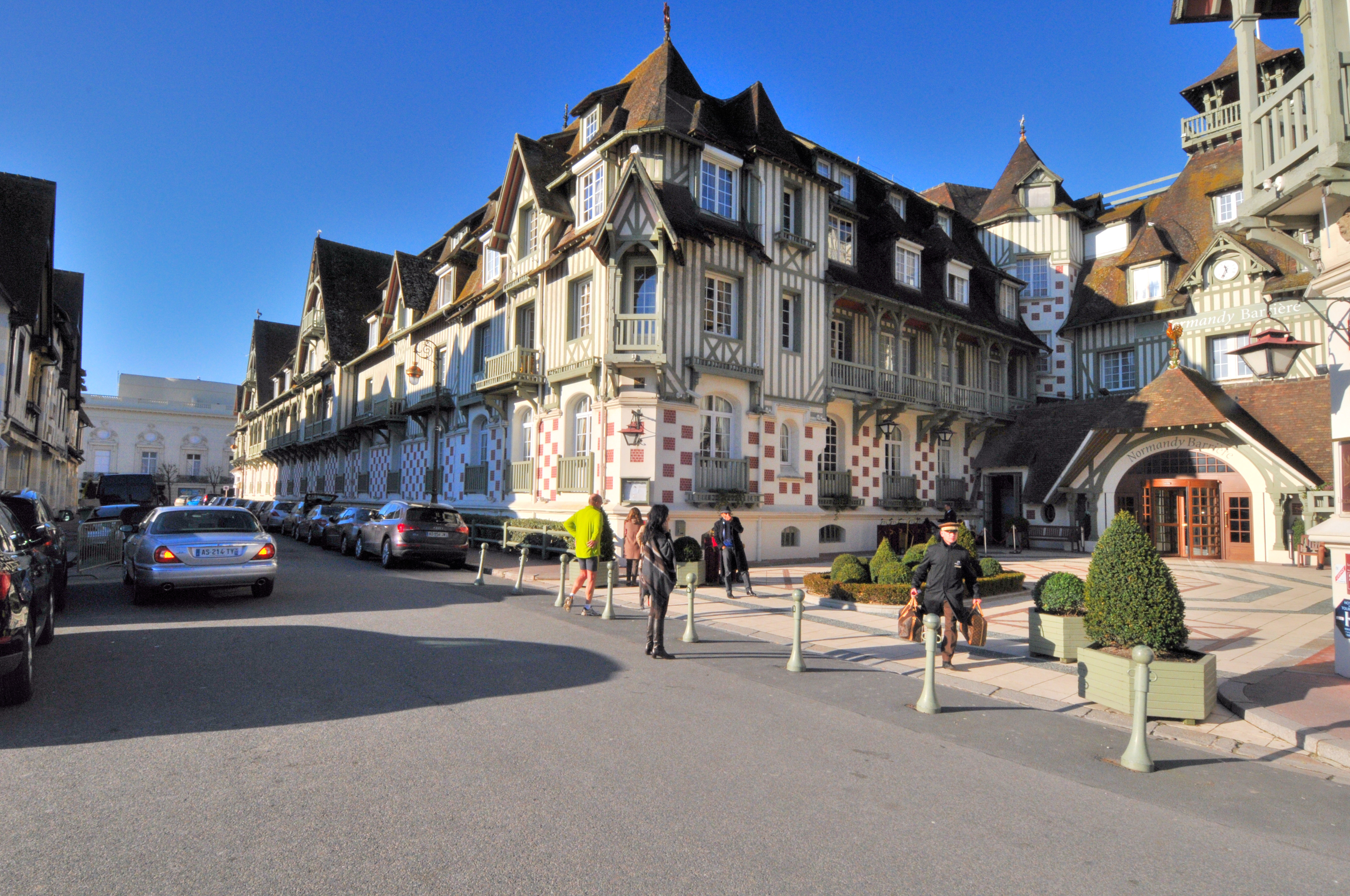 le Normandy Barrière à Deauville dans le Calvados (Normandie, France).